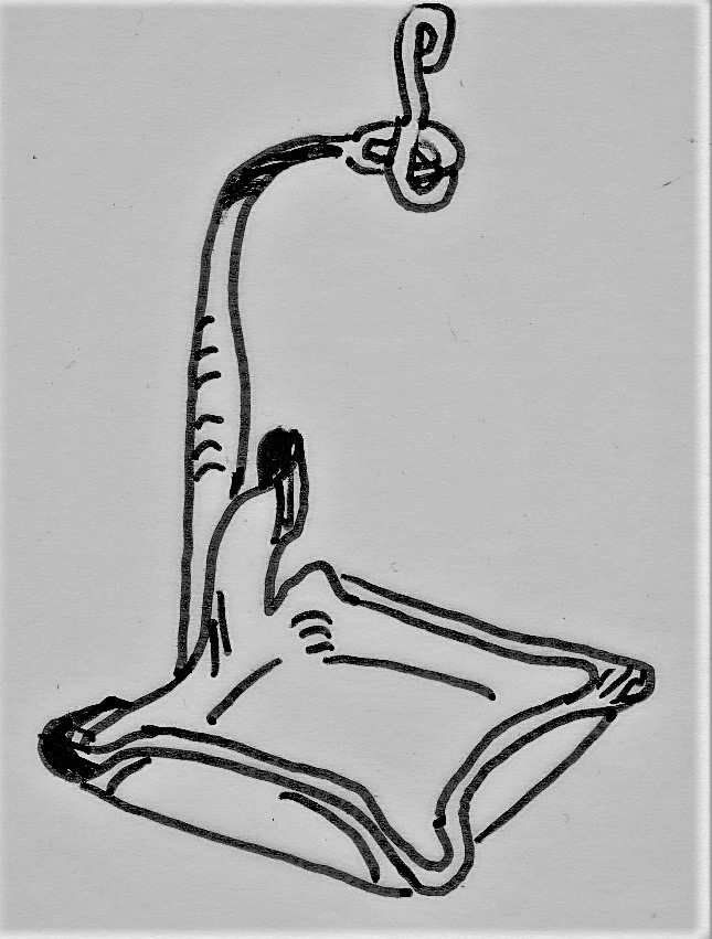 Öllampe. Einfacher "Krüsel" aus Eisenblech mit doppelter Ölschale und Schnaupen für vier Dochte, zum Aufhängen. Norddeutschland, 19. Jahrhundert